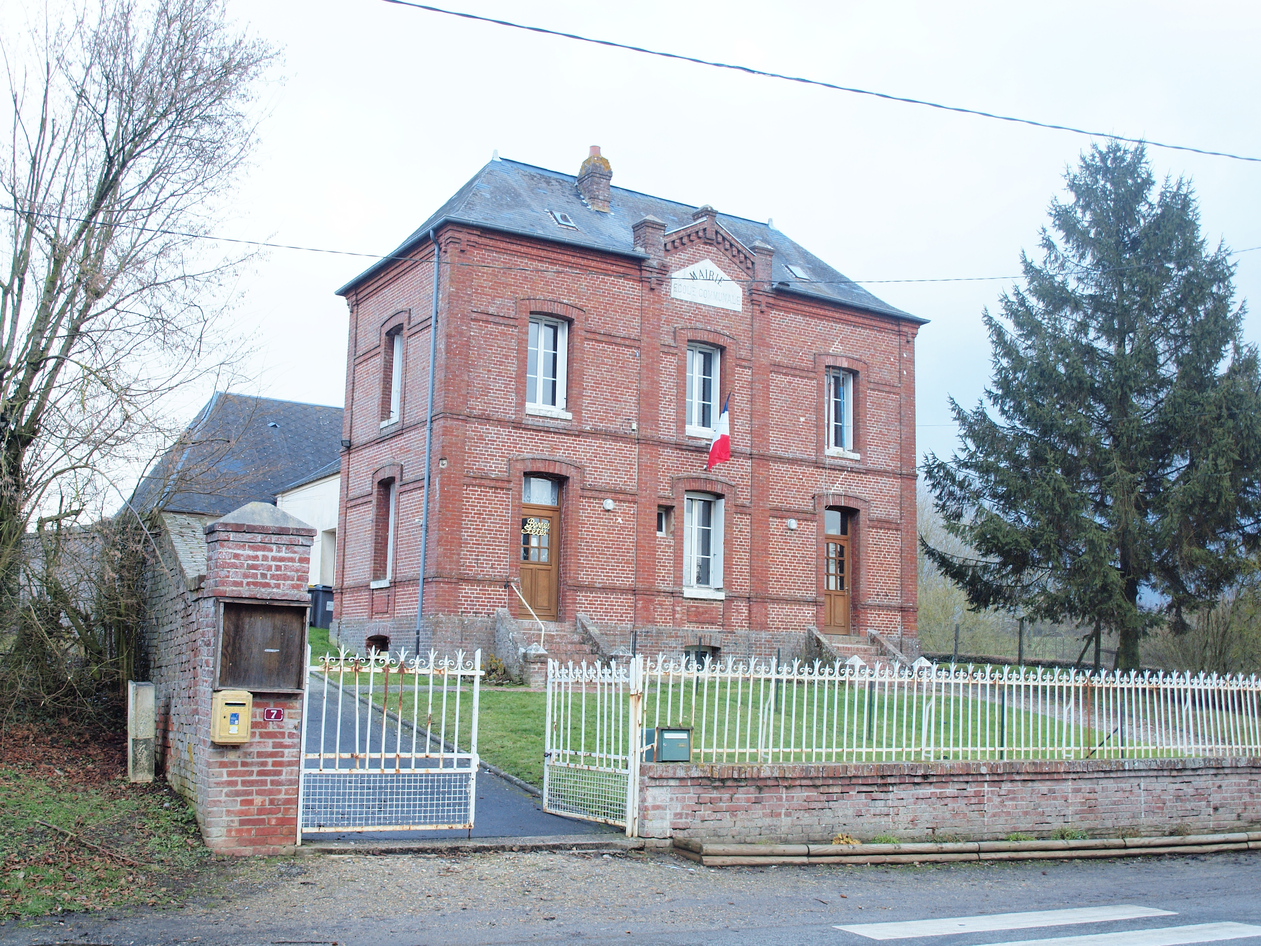 La Bellière (Seine-Maritime, France)